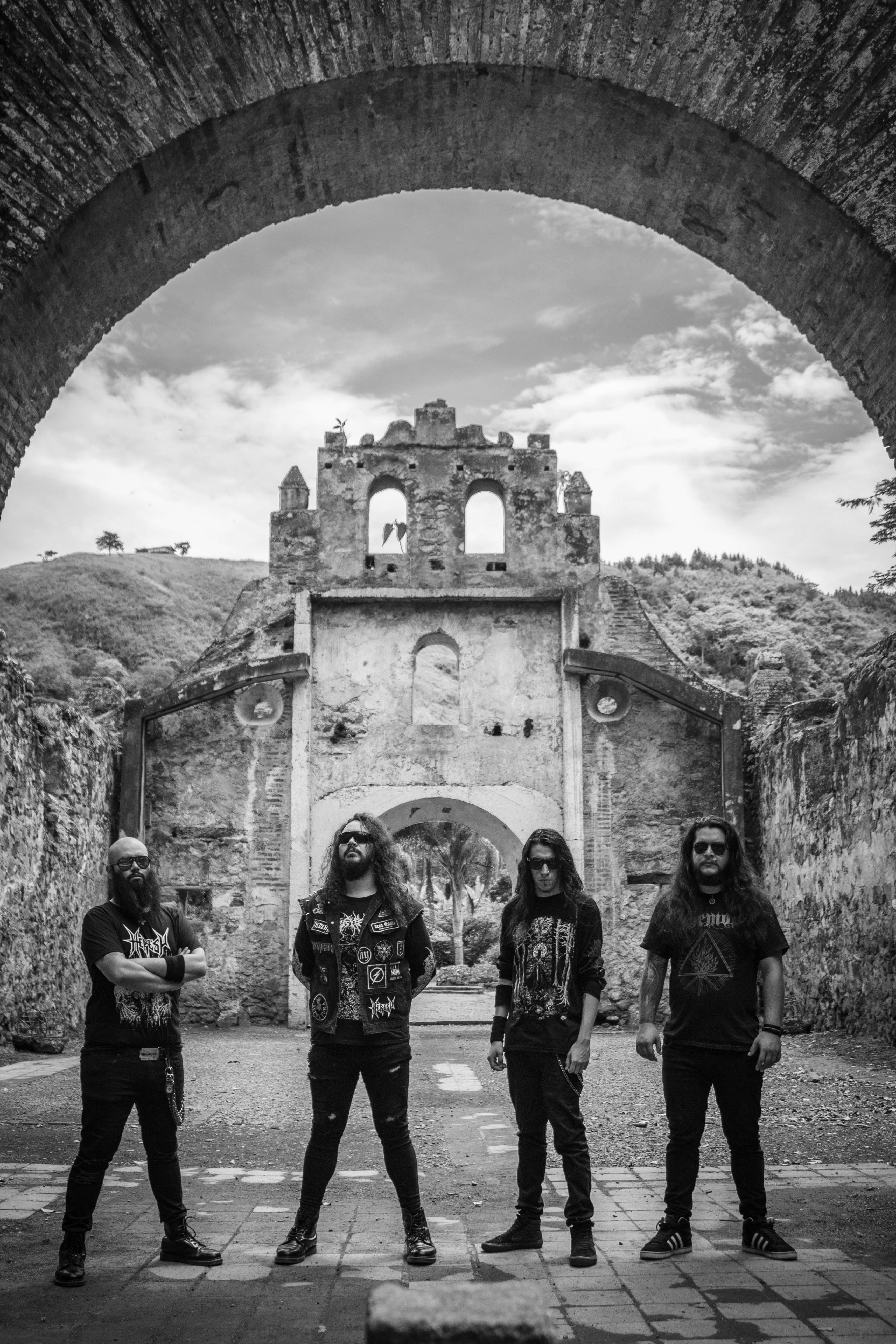 De izquierda a derecha: Blop Heresy (Bajo), Jos Raley (Guitarra y Vocales), Kevin Venegas (Guitarra), Dennis Abrahams (Batería) Foto por Alejandra Valenciano